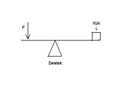 Basit makine türlerinden biri